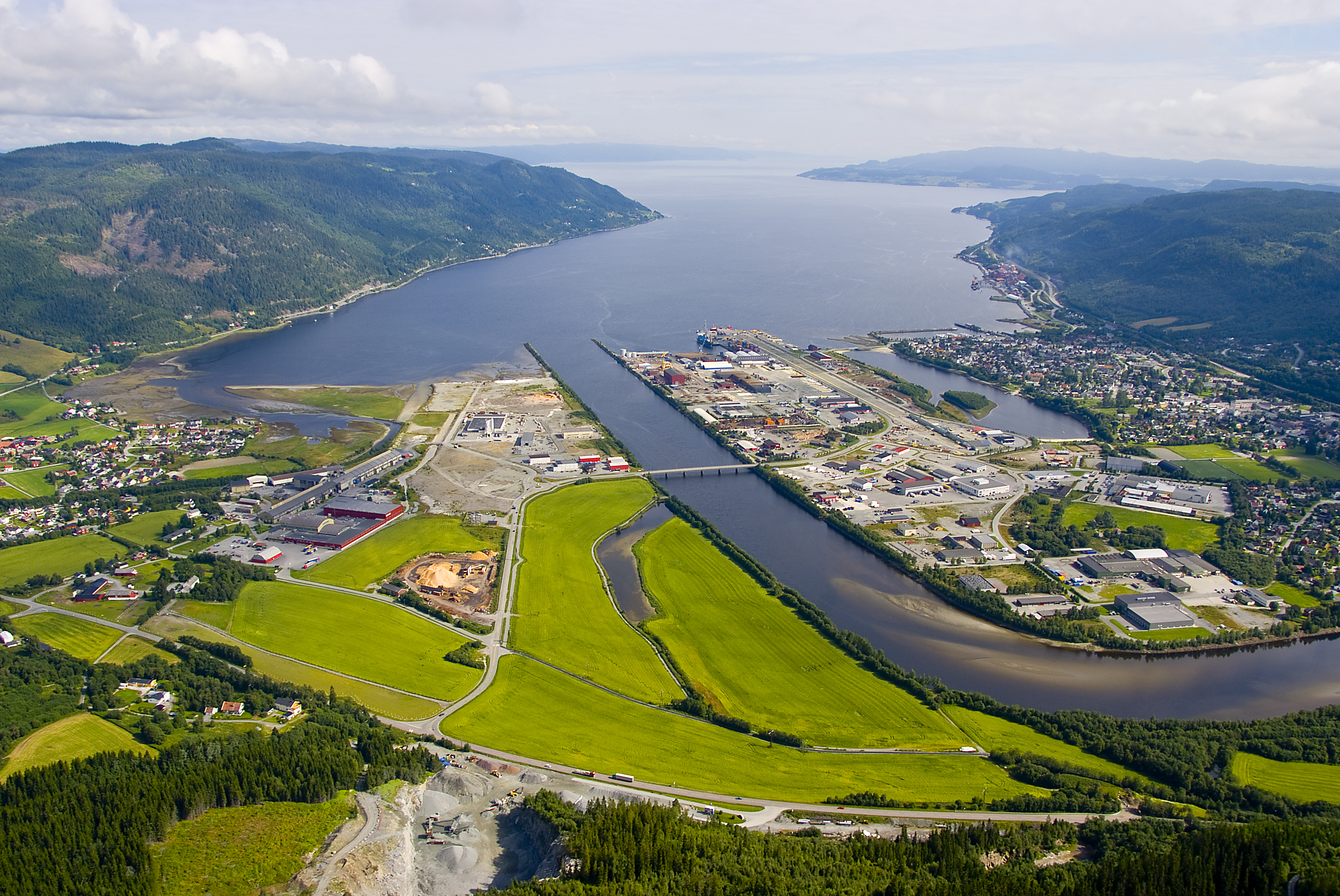 Foto: Trondheim Havn/Åge Hojem